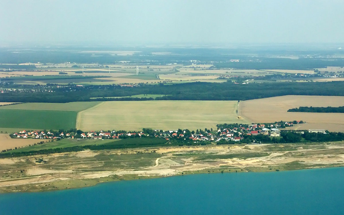 Störmthal am Nordostufer des Störmthalers Sees. Bildmitte - das Oberholz